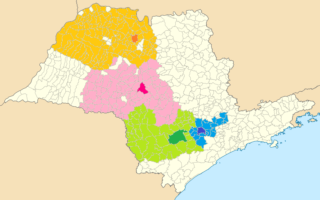 Cobertura das emissoras da Rede TEM. Laranja - TV TEM São José do Rio Preto Rosa - TV TEM Bauru Verde - TV TEM Itapetininga Azul - TV TEM Sorocaba